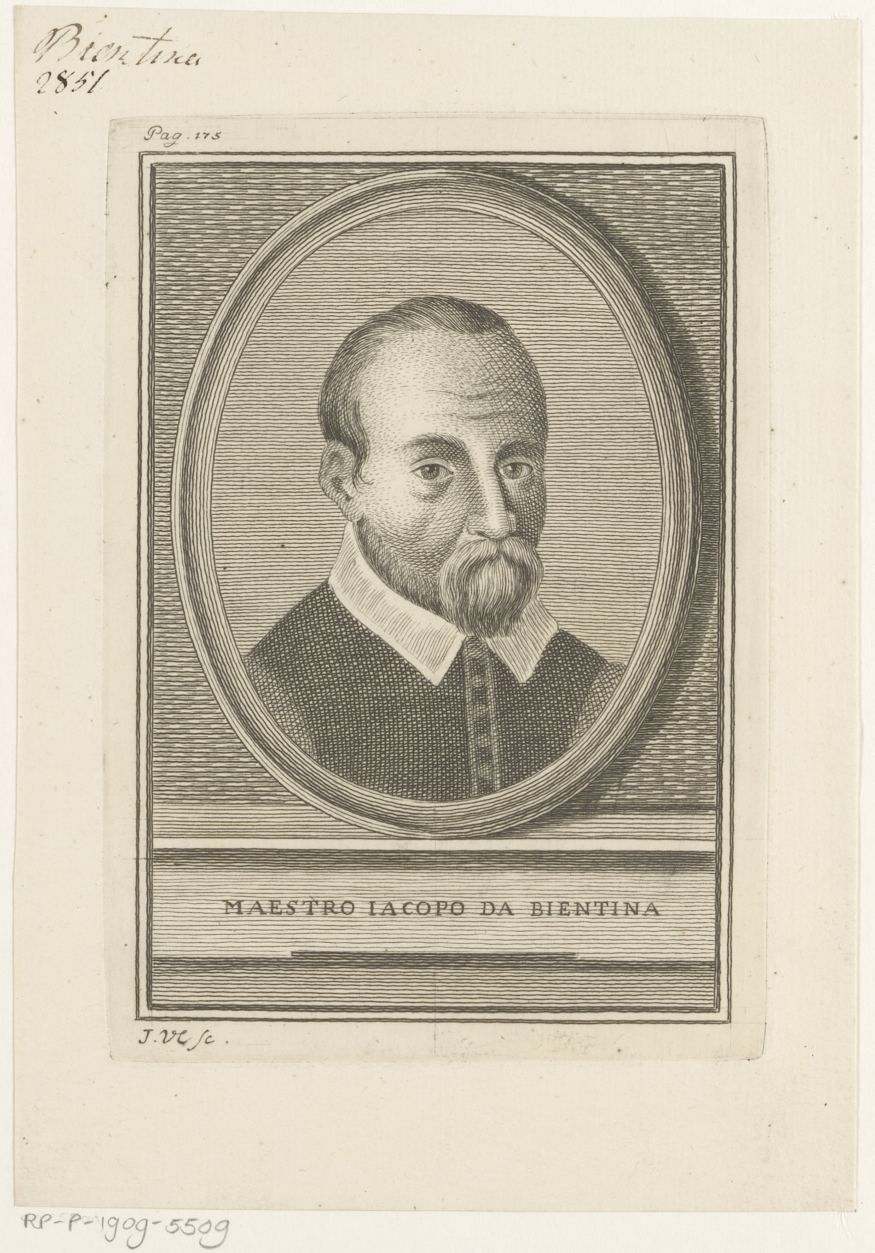 IdentificatieTitel(s): Portret van liedschrijver Iacopo da BientinaPortretten van schrijvers die liederen schreven voor Lorenzo de'Medici (serietitel)Objecttype: prent boekillustratie Objectnummer: RP-P-1909-5509Opschriften / Merken: verzamelaarsmerk, verso, gestempeld: Lugt 2228opschrift, recto boven, handgeschreven in bruine inkt: ‘Bientina / 2851’Omschrijving: Genummerd linksboven: Pag. 175.VervaardigingVervaardiger: prentmaker: J. Verkruys (vermeld op object)uitgever: CosmopoliPlaats vervaardiging: prentmaker: Italiëuitgever: LuccaDatering: 1750Fysieke kenmerken: gravureMateriaal: papier Techniek: graveren (drukprocedé)Afmetingen: plaatrand: h 164 mm × b 113 mmToelichtingPrent gebruikt voor Grazzini, Anton Francesco. Tutti i trionfi, carri, mascherate o canti carnascialeschi andati per Firenze dal tempo del Magnifico Lorenzo de' Medici fino all' anno 1559 : in questa seconda edizione corretti, con diversi MSS. collazionati, delle loro varie lezioni arricchiti, notabilmente accresciuti, e co' ritratti di ciascun poeta adornate. Lucca: Cosmopoli, 1750.OnderwerpWat: historical personsportrait of a writerwriter, poet, authorbarber; surgeonWie: Iacopo da BientinaVerwerving en rechtenVerwerving: aankoop 1905Copyright: Publiek domein